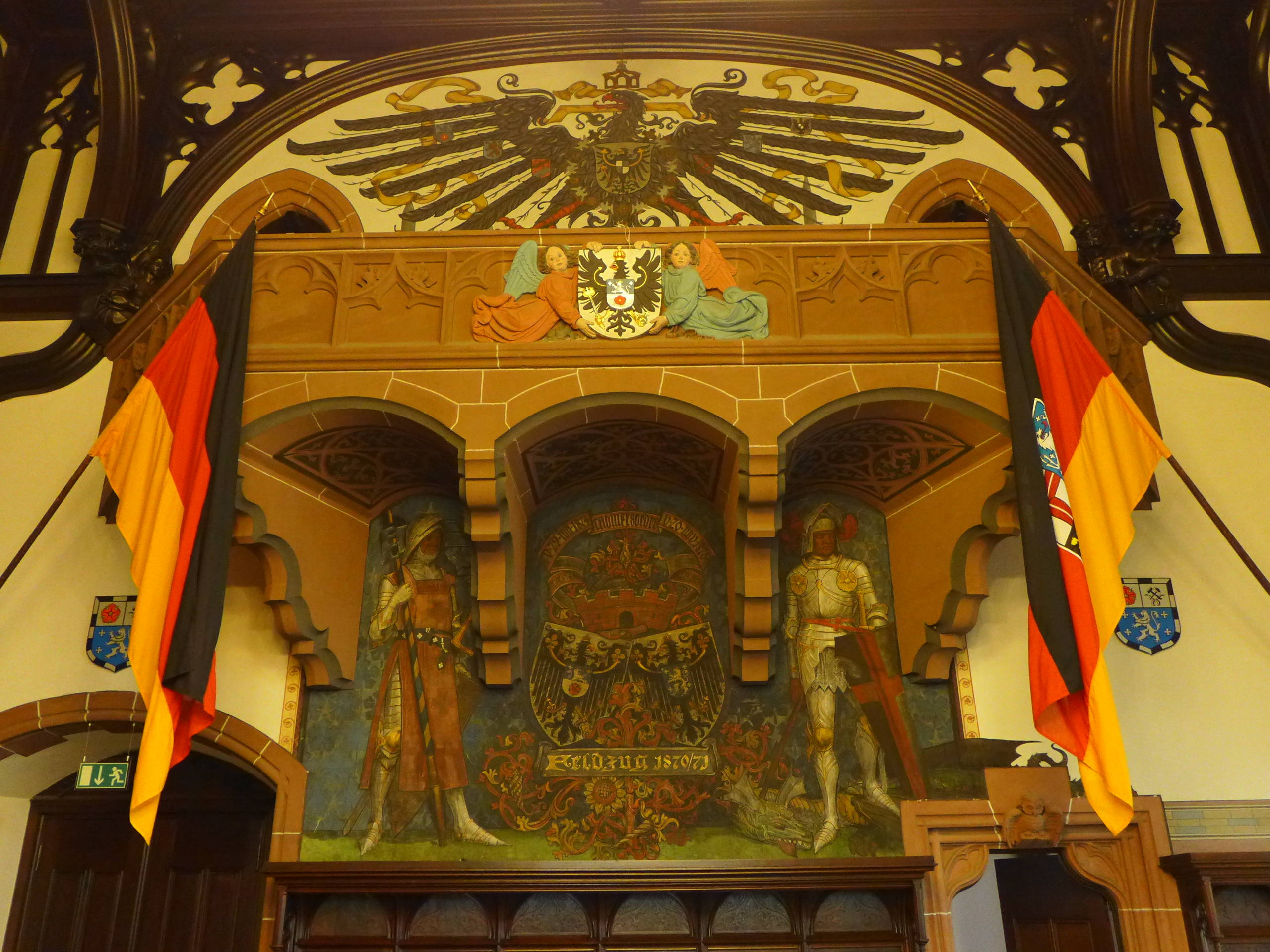 Rathaus St. Johann, Festsaal, Balkon mit Reichsadler und Rittern